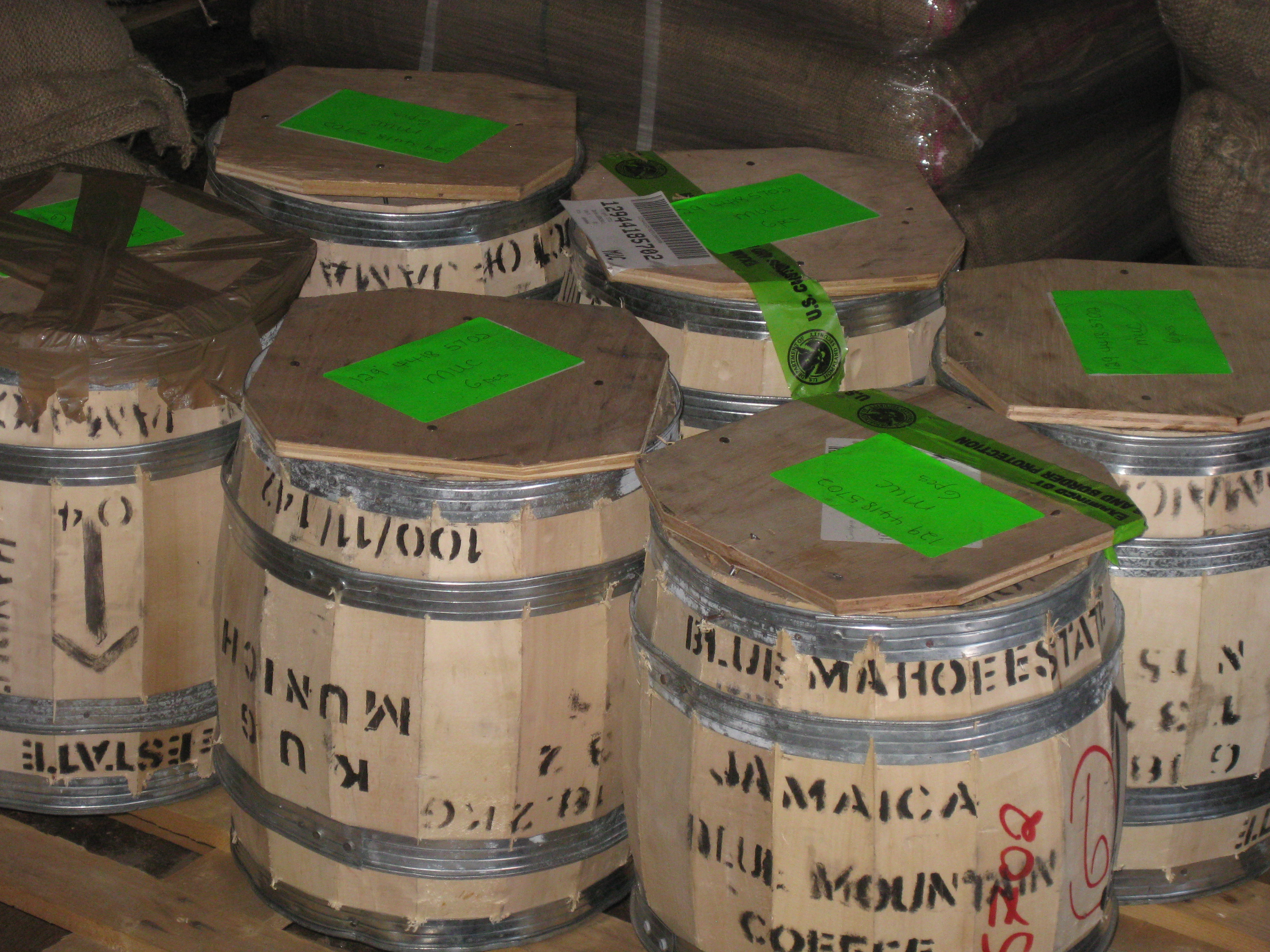 Holzfässer des Jamaica Blue Mountain Kaffees